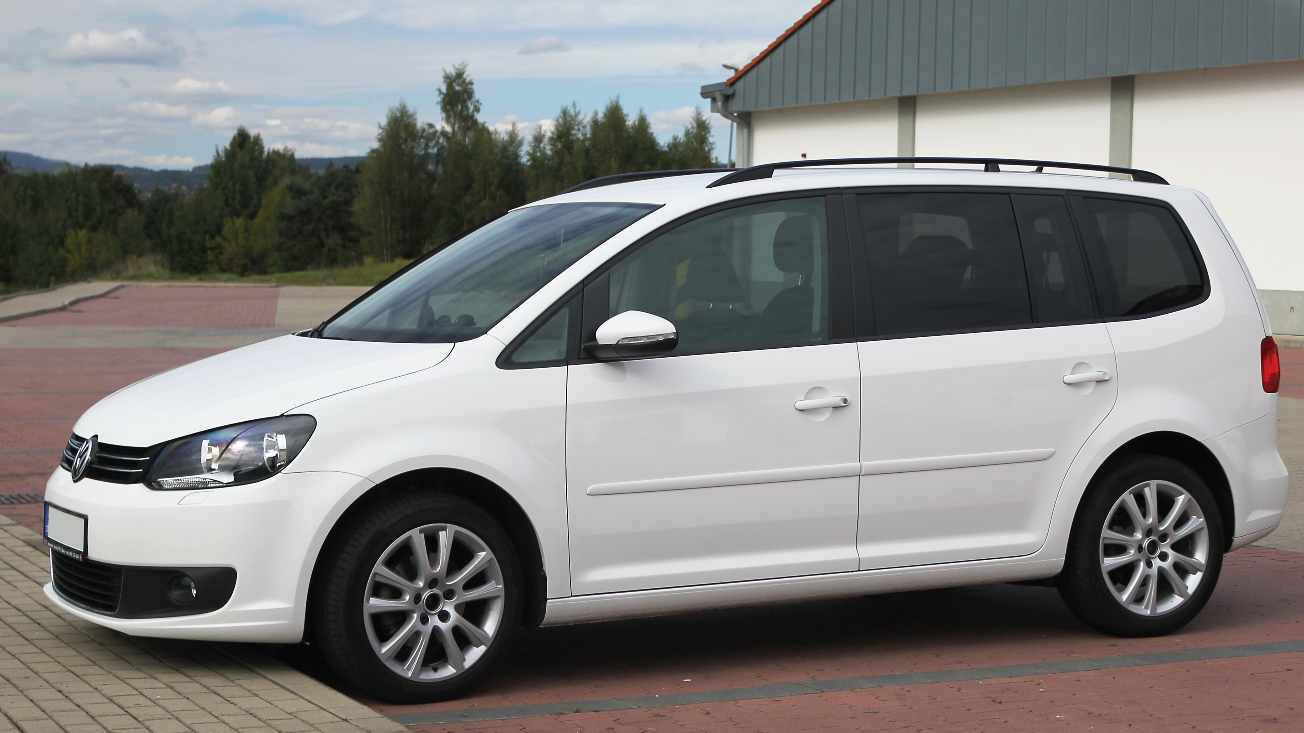 Volkswagen Touran (facelift II)